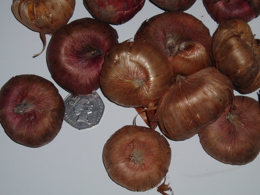 Gladioli (Gladiolus L.) bulbs.